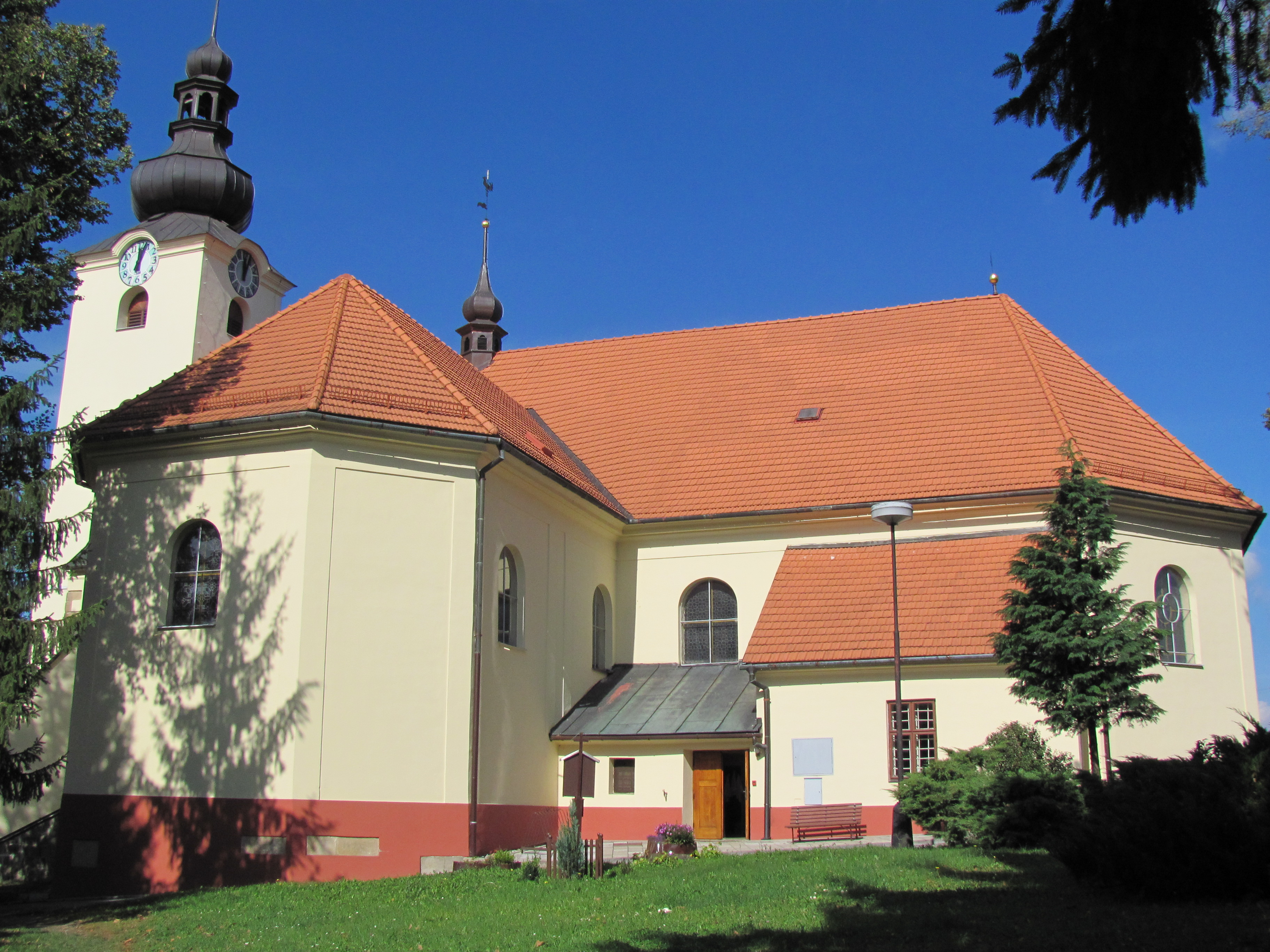 Kostel sv. Václava (Brumov), Brumov-Bylnice, pohled od jihu, snímek pořízen 30.9.2012